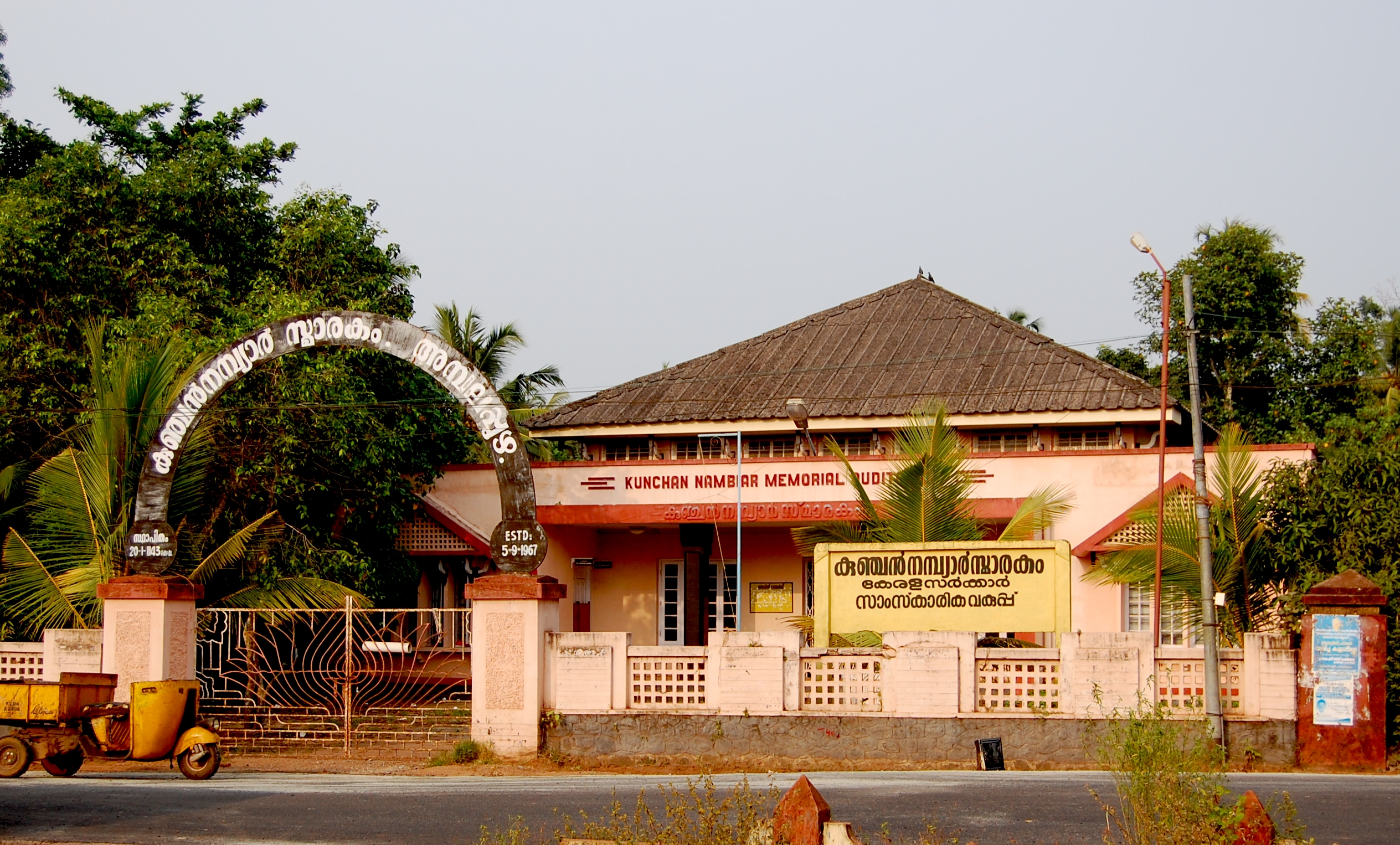 കുഞ്ചൻ സ്മാരകം. അമ്പലപ്പുഴ, ആലപ്പുഴ